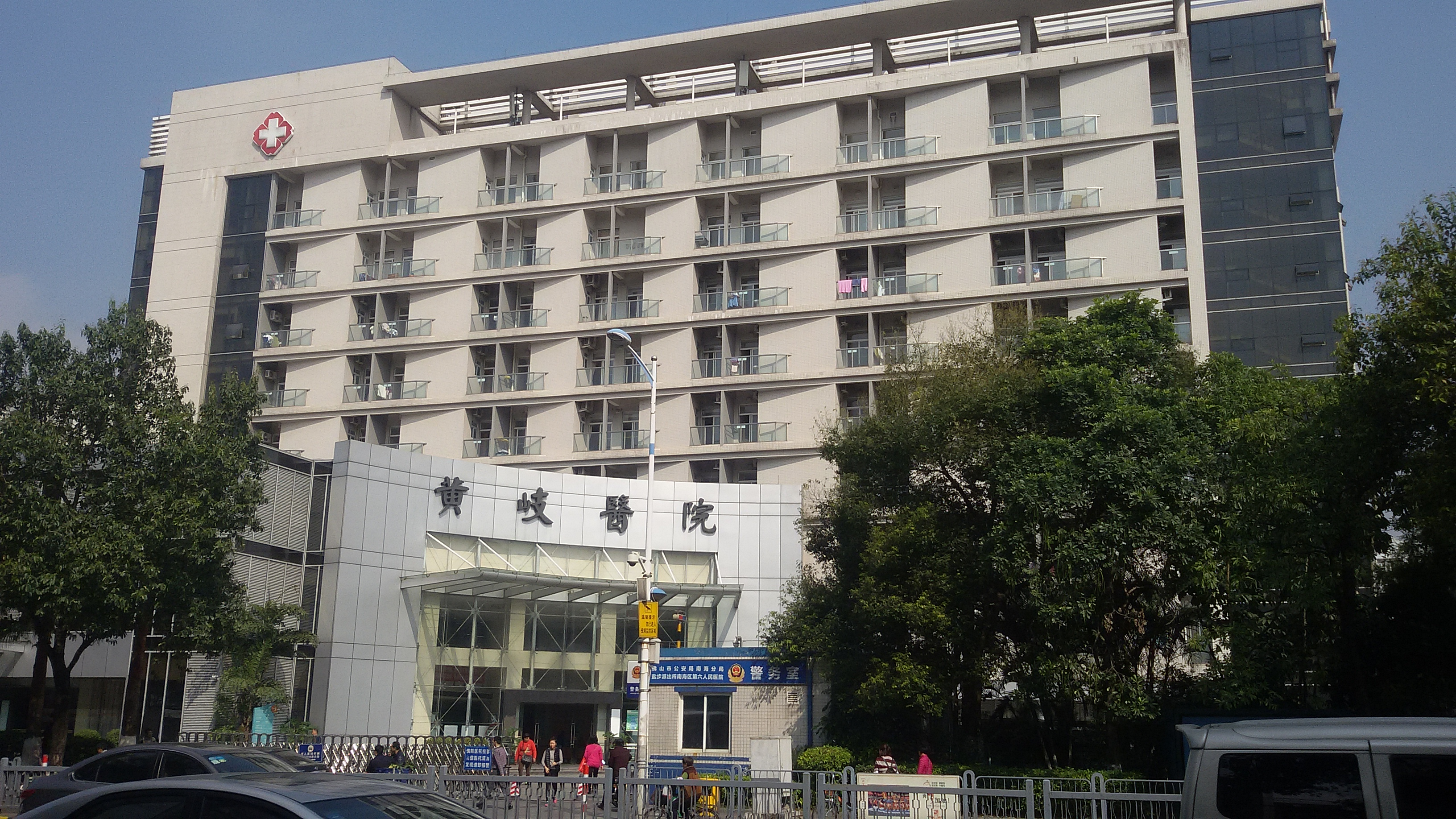 粵語: 黃岐醫院（南海區第六人民醫院）